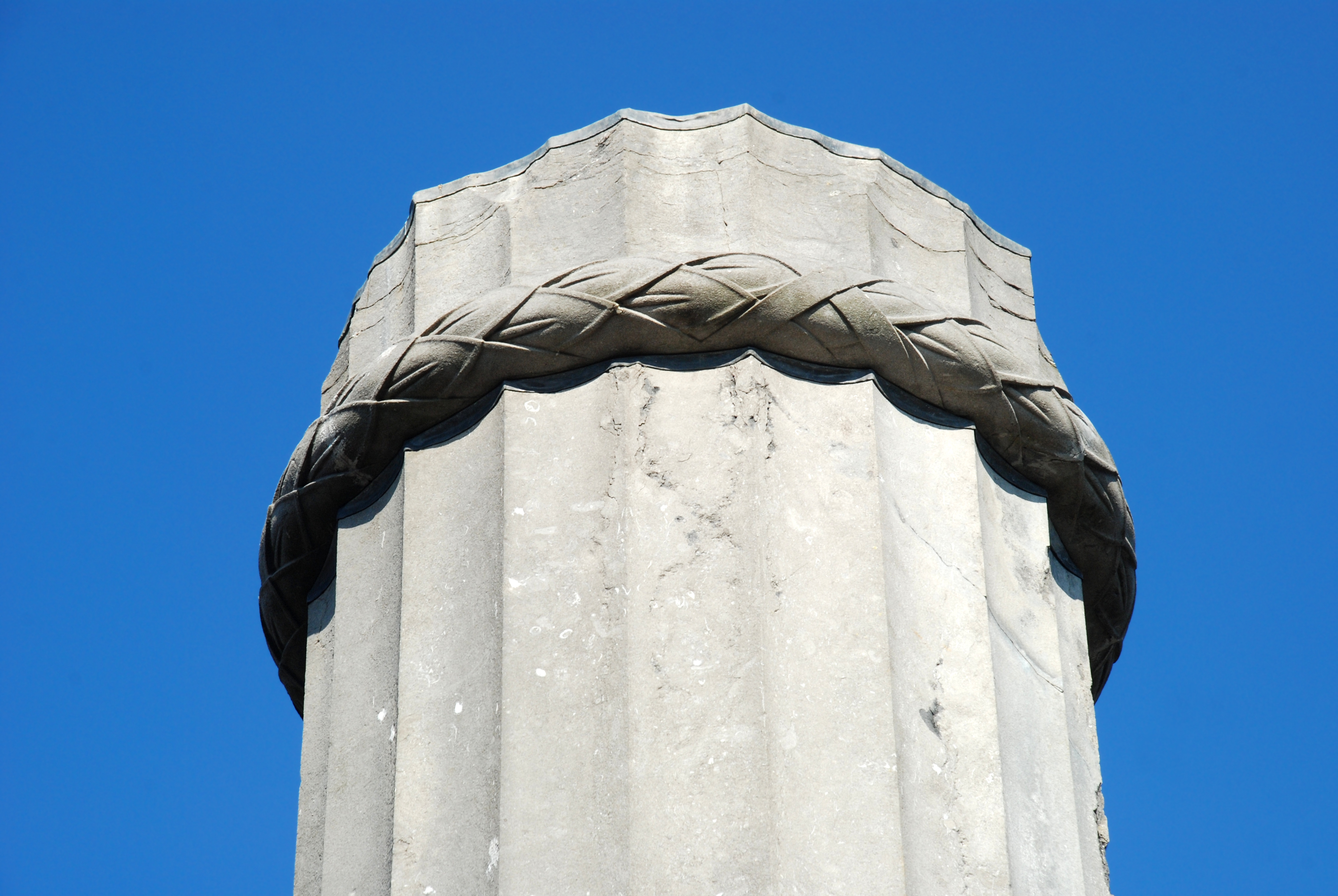 Belgique - Brabant wallon - Monument Gordon